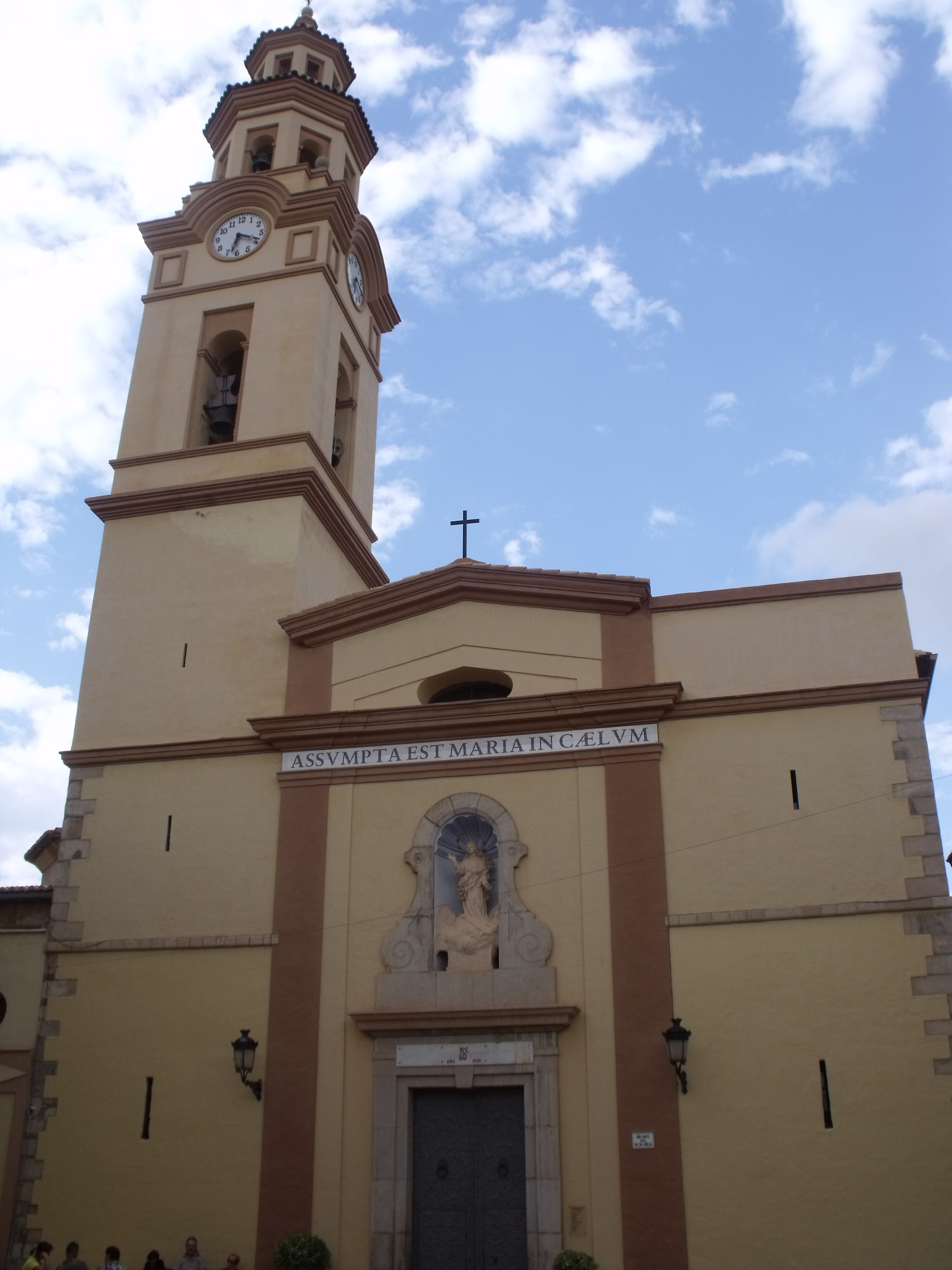 Fachada iglesia de la Asunción